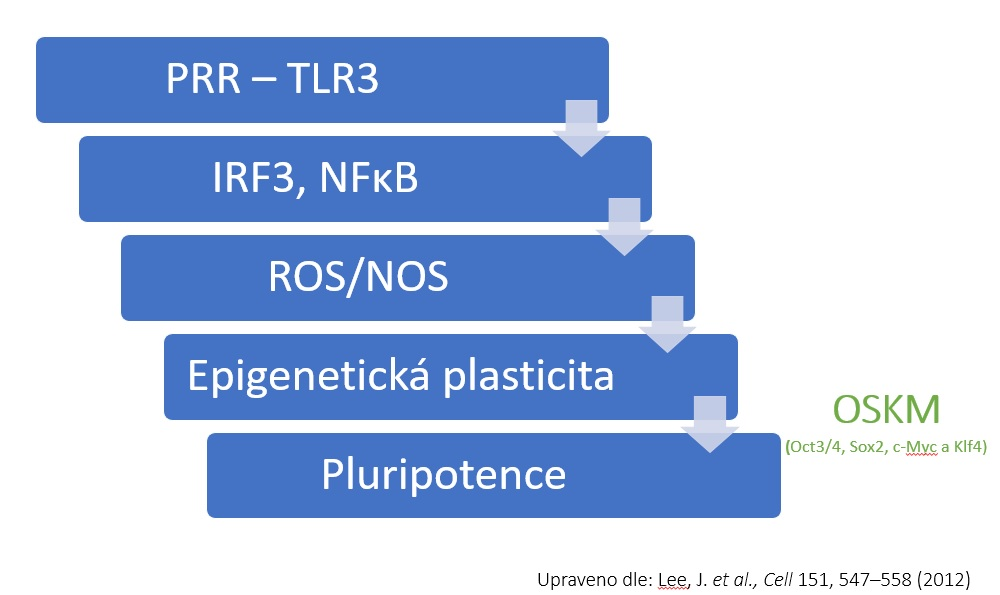 Během přeprogramování buněk virovými vektory dochází k aktivaci TLR3 a spuštění vrozené imunitní odpovědi. Následná aktivace NFκβ, a s tím související vznik kyslíkových radikálů, se podílí na remodelaci chromatinu a usnadňuje zavedení transkripčních faktorů (OSKM) na příslušné geny.